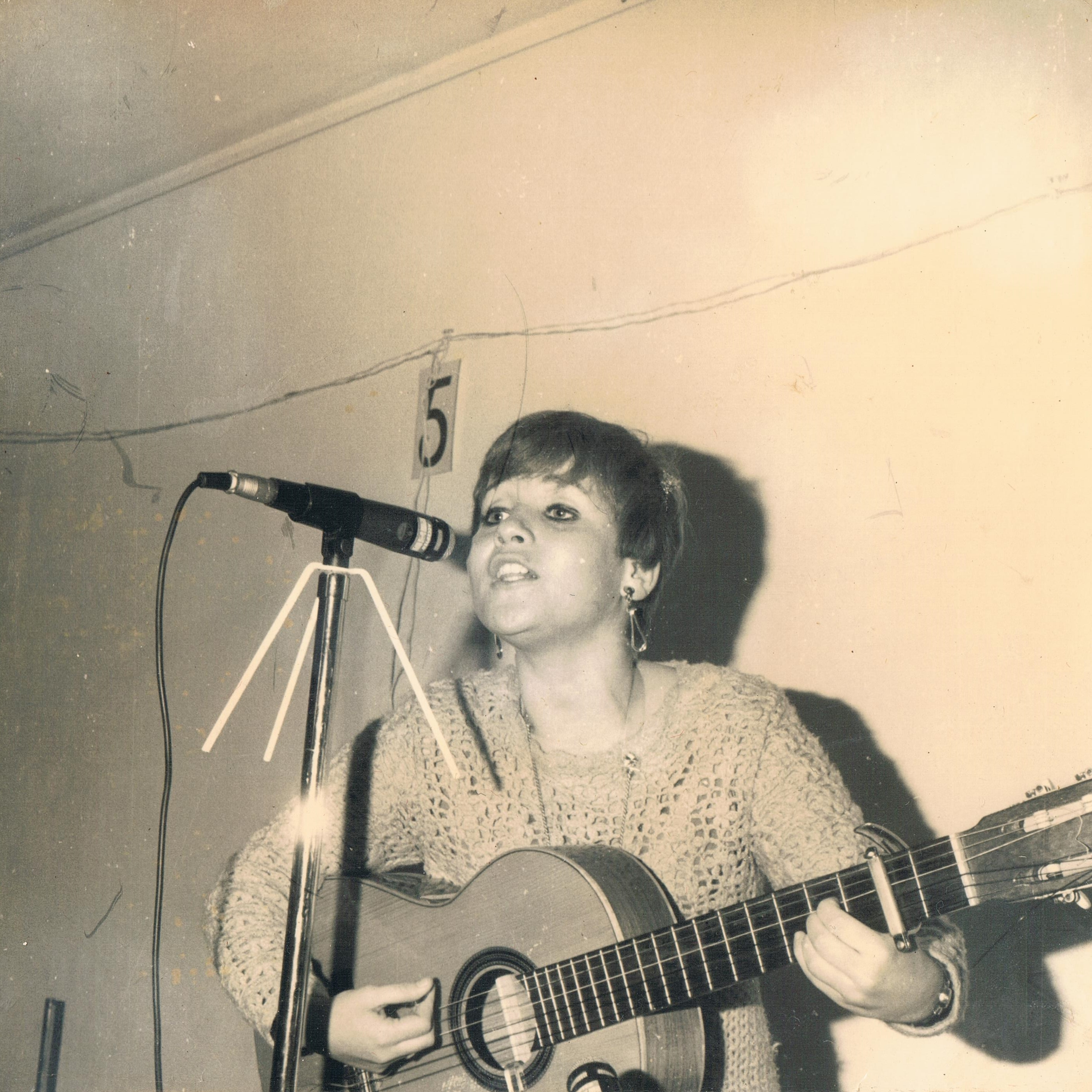 גליה ישי מופיעה מול חיילים, טרם התגייסותה לצה"ל